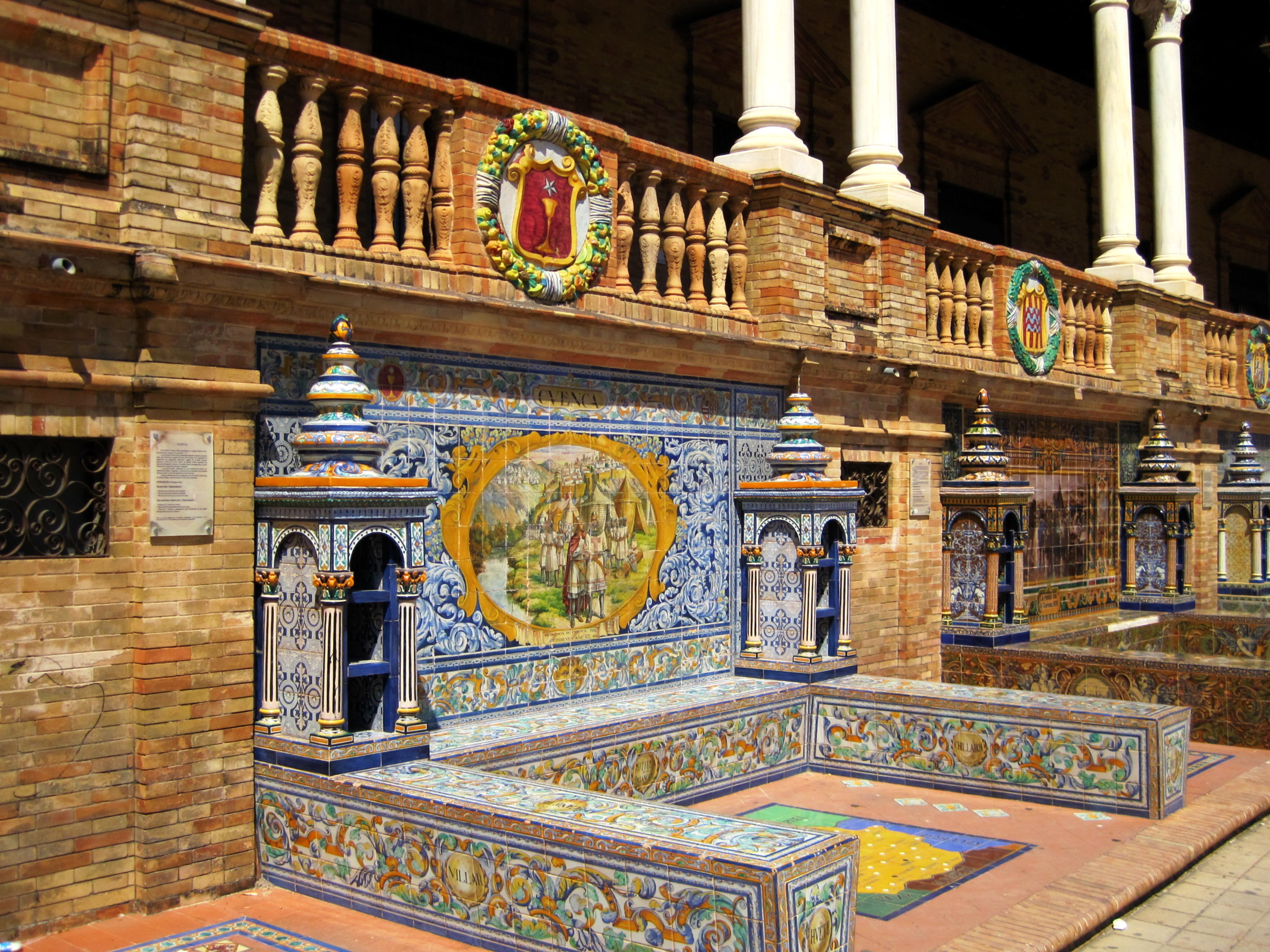 Plaza de España